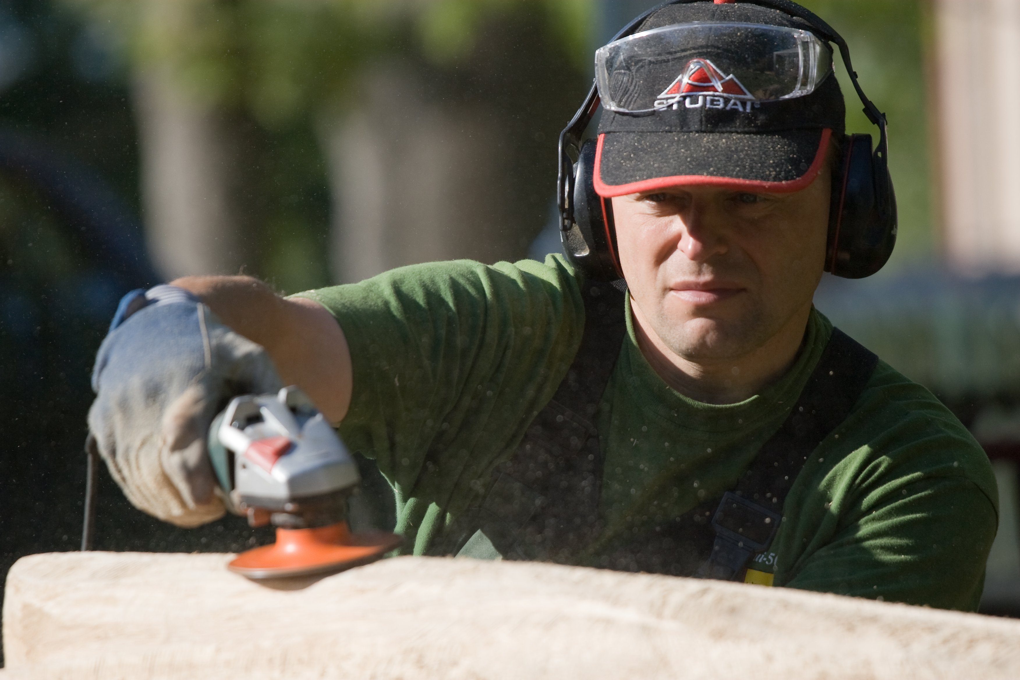 Kęstutis Krasauskas Rokiškio plenere 2009 metai